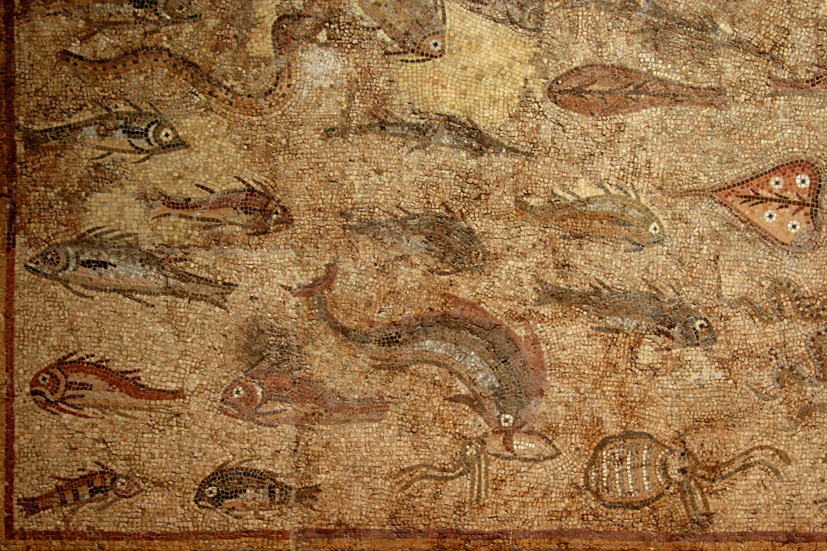 Mosaico de los peces de La Pineda. Detalle. Museu Nacional Arquelògic de Tarragona (MNAT)